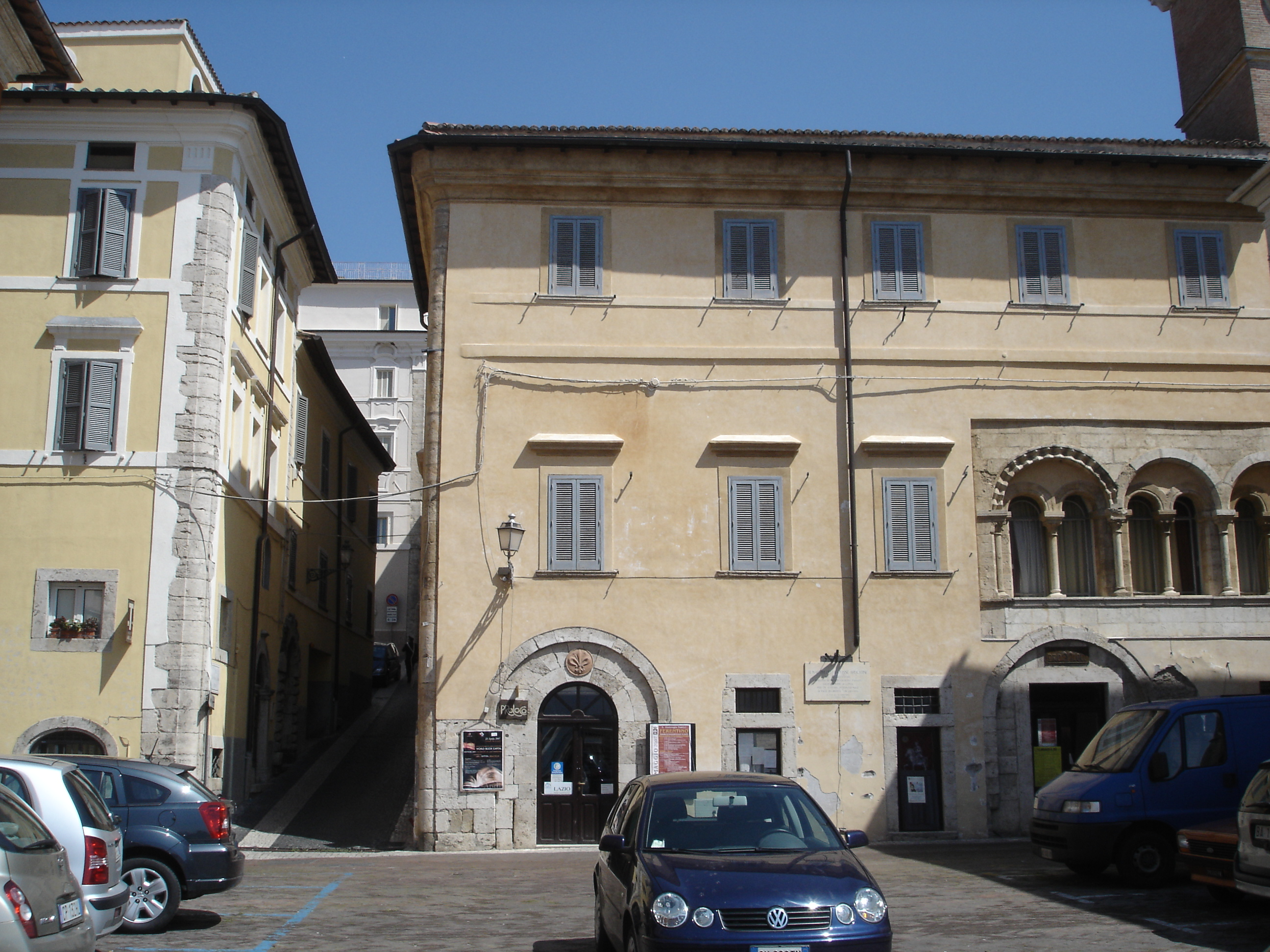 Descrizione Palazzo dei Consoli